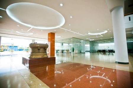 Trường Trung học phổ thông FPT ra đời với mong muốn tạo nên một ngôi trường hiện đại nhưng vẫn lưu giữ được những nét truyền thống của dân tộc, giúp học sinh phát triển toàn diện cả về thể chất lẫn tinh thần.